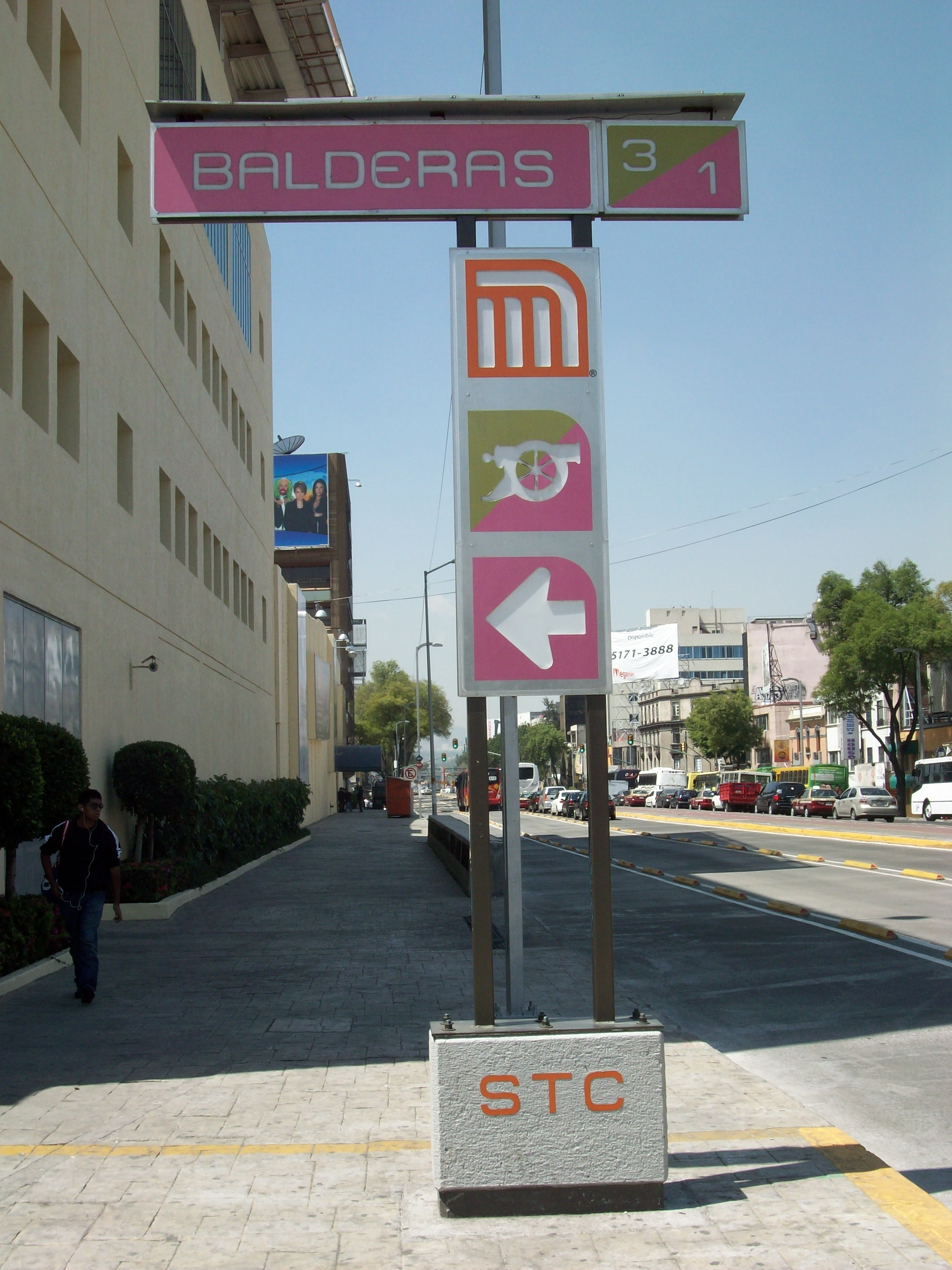 Estela de la estacion Balderas